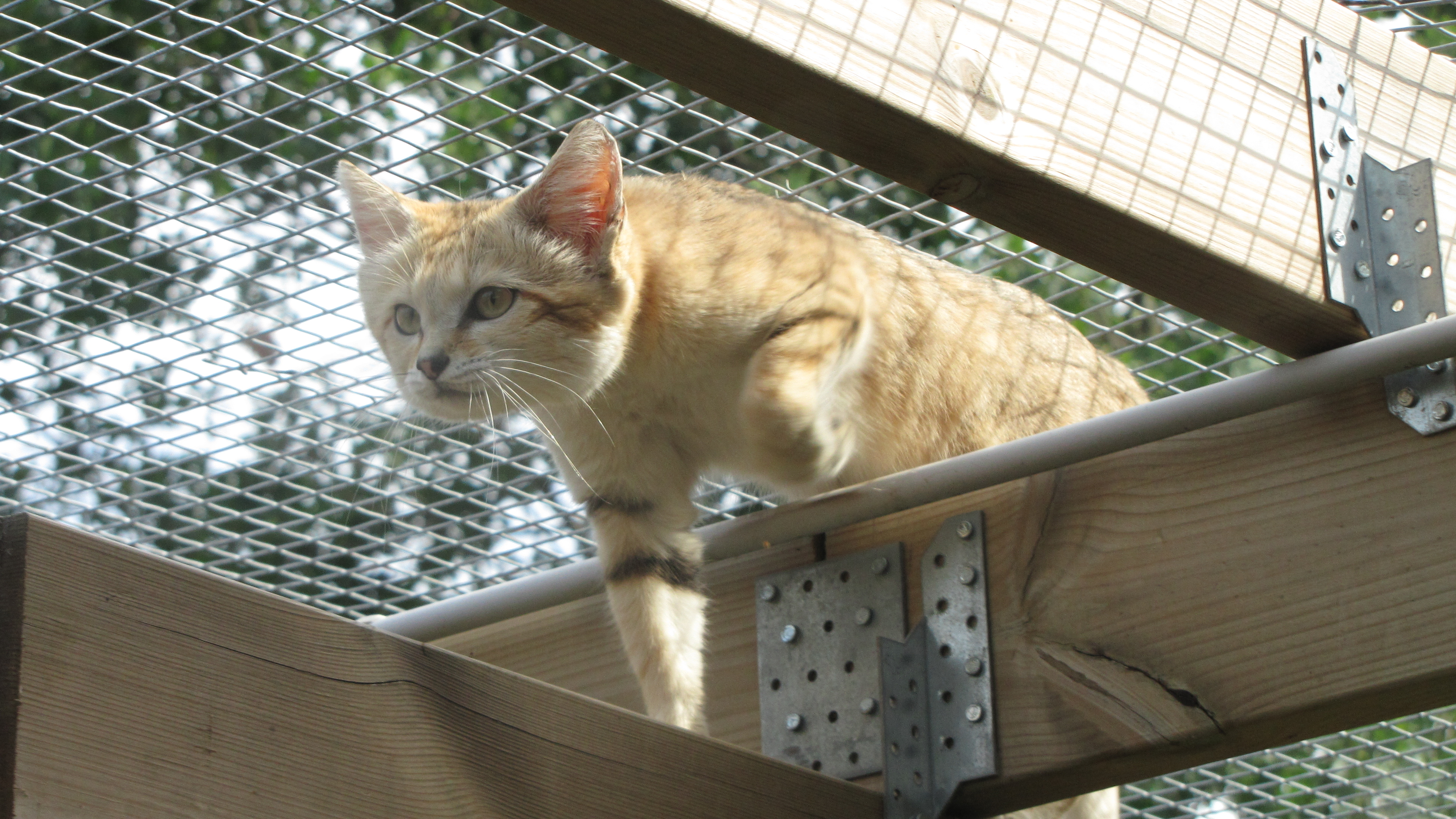 Luitekass Tallinna loomaaias